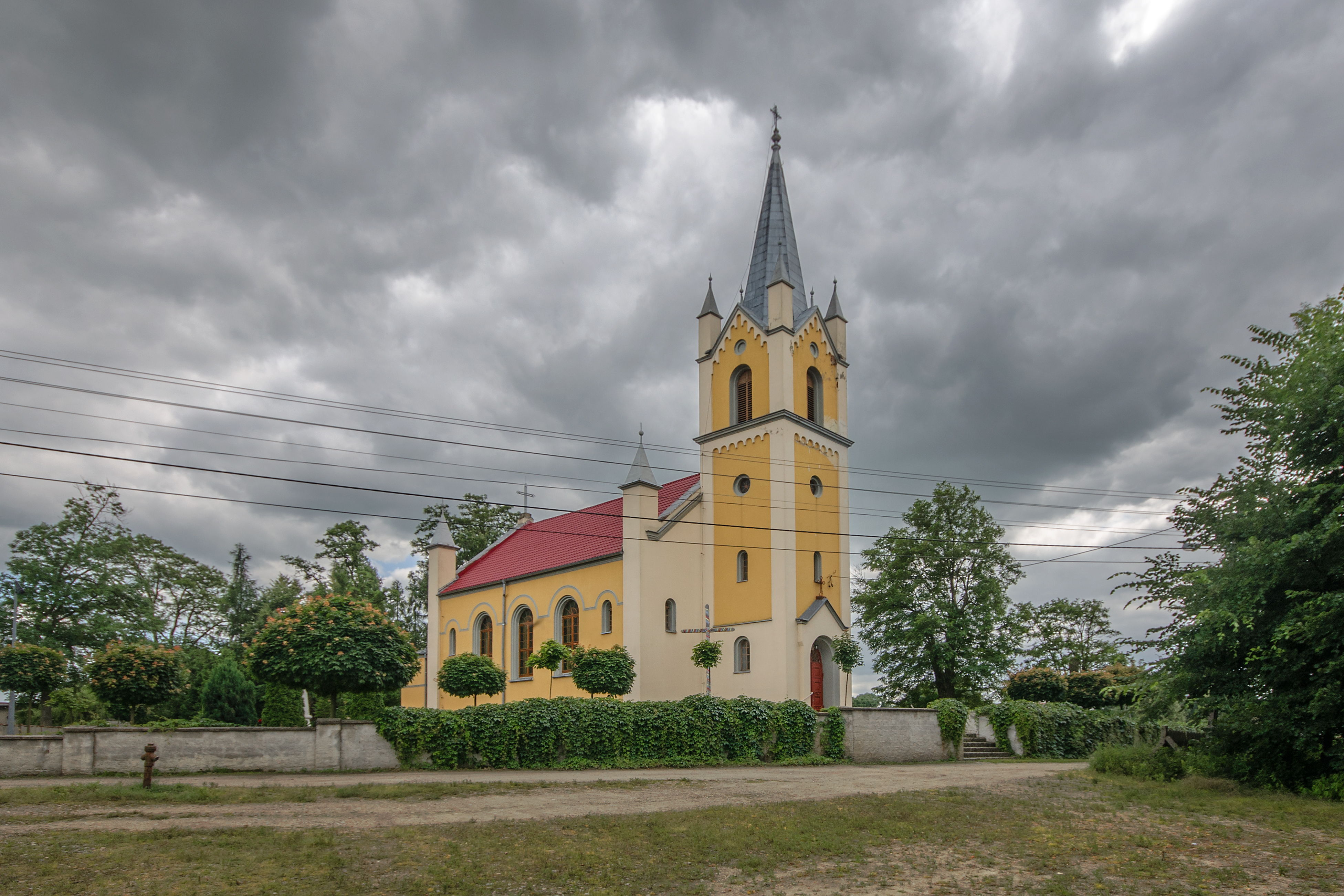 Kościół Wszystkich Świętych w Głuszynie, woj. opolskie, pow. namysłowski, gm. Namysłów